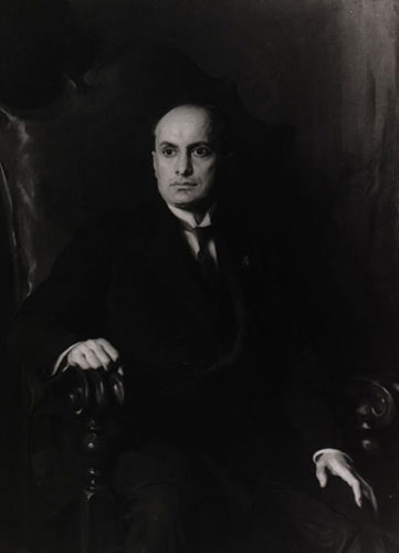 Benito Mussolini, by Philip Alexius de László, 1923